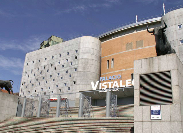 Palacio Vistalegre. Entre la calle de Castrogeriz y la calle Matilde en Carabanchel (Madrid). Antigua plaza de toros de Vistalegre, cubierta y remodelada para actividades deportivas, aunque también se usa como coso taurino.